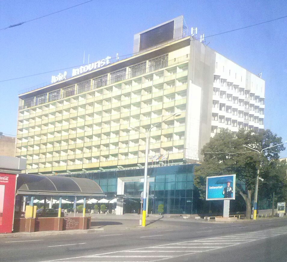 Запоріжжя, проспект Соборний, 135